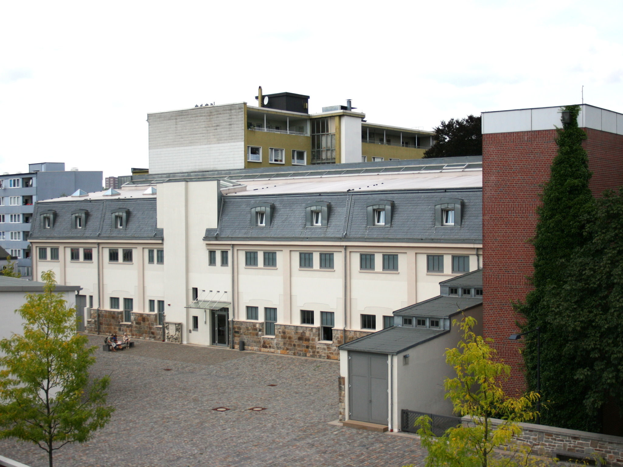 Museum für Frühindustrialisierung im Historischen Zentrum, Wuppertal